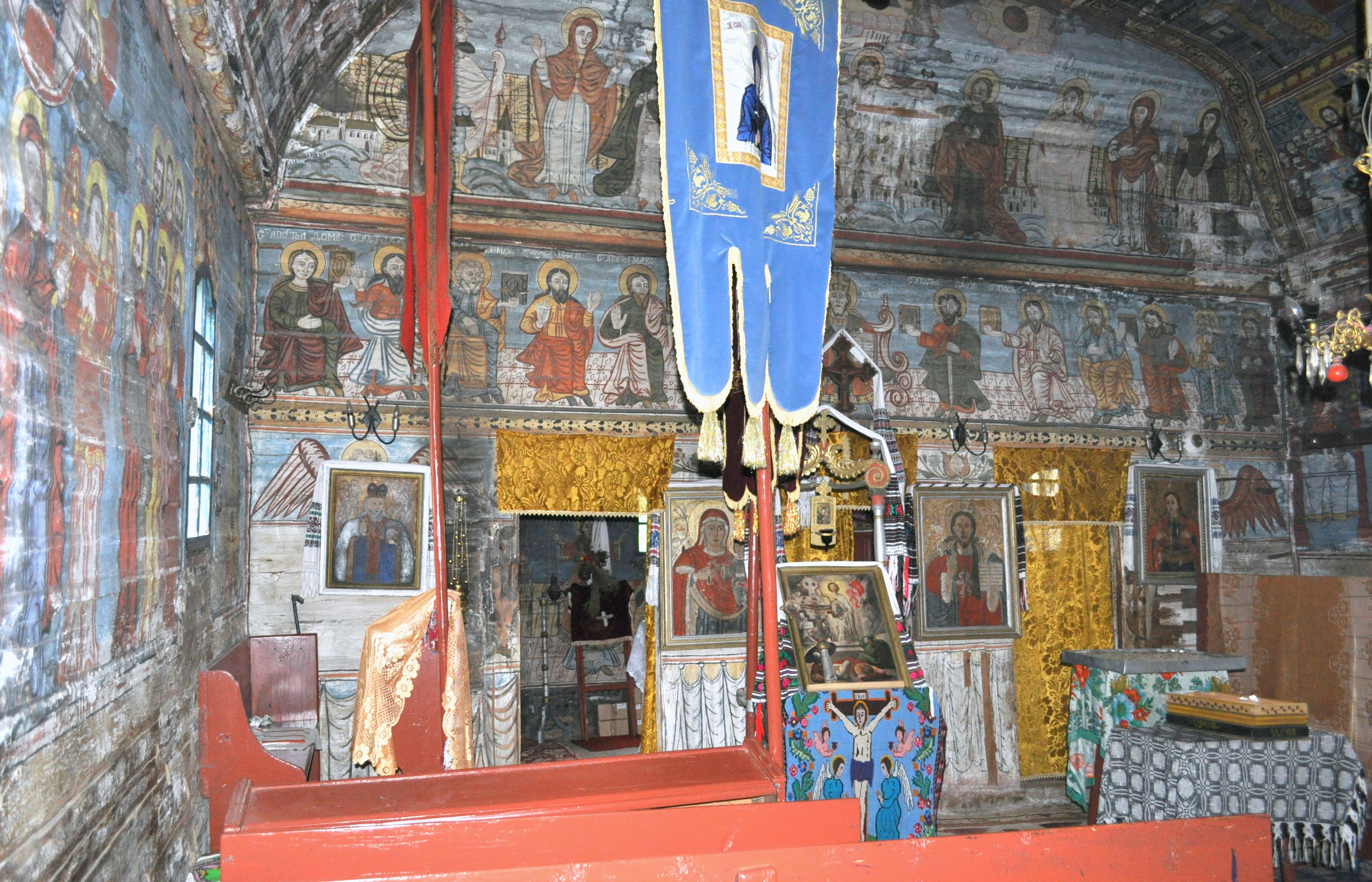 Biserica de lemn „Sfinții Arhangheli” din Runc, județul Alba